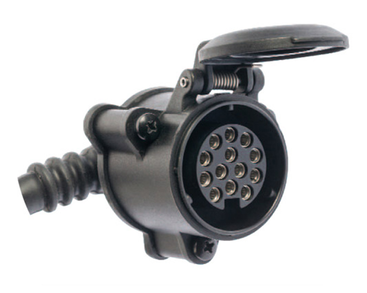 Steckdosenset mit Kontakten, Kontaktträger und EPDM-Dichtung 90°